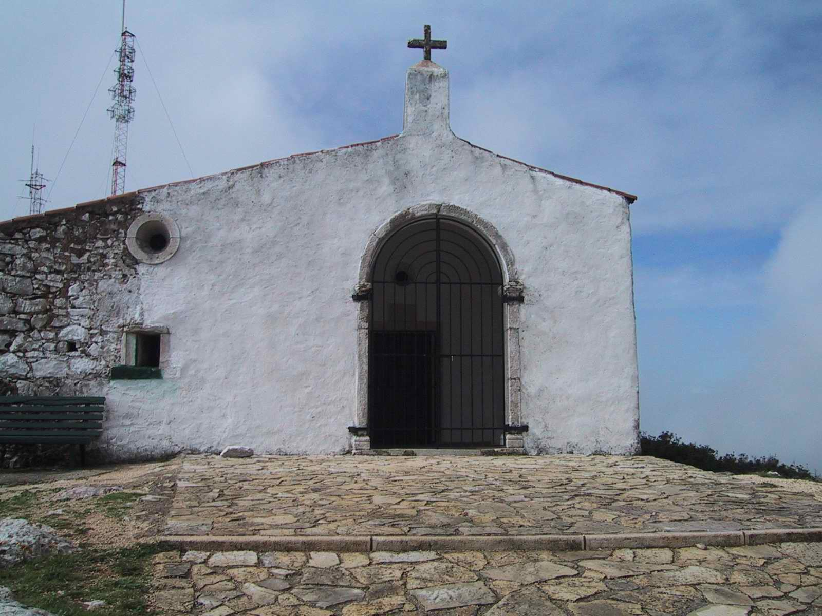 Imagem da Capela de São João Baptista,Serra de Montejunto